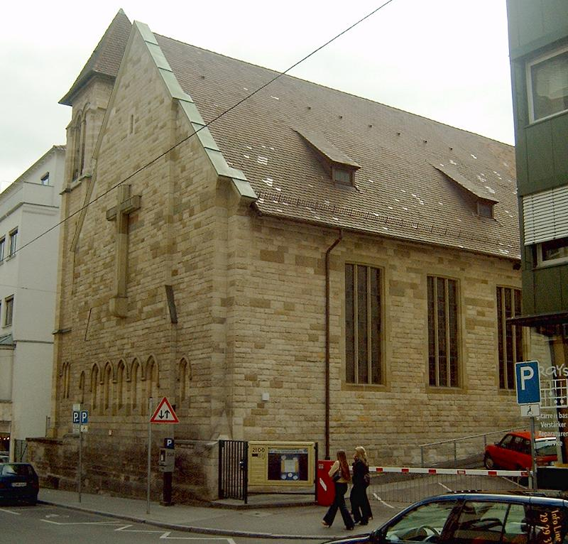 Auferstehungskirche Stuttgart (2013 abgerissen)